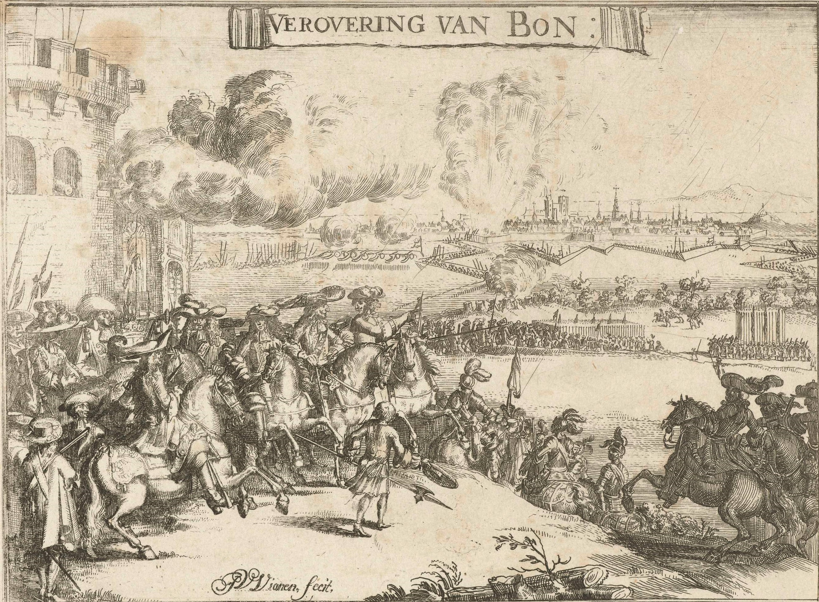 Die von Truppen Ludwigs XIV besetzte Stadt Bonn wird im Jahre 1689 während des Pfälzer Erbfolgekriegs durch alliierte Truppen belagert und entsetzt.